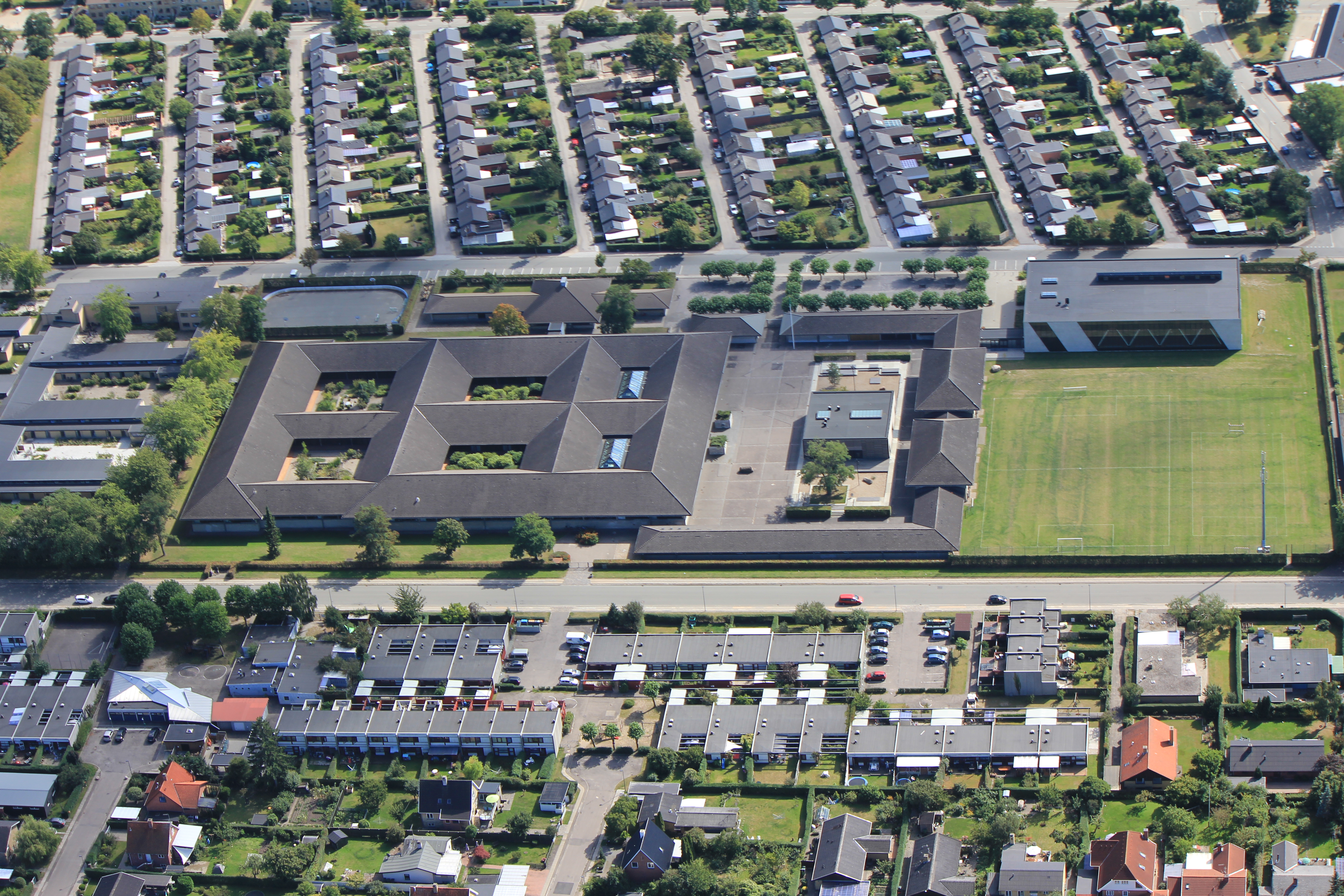 TG Luftfoto